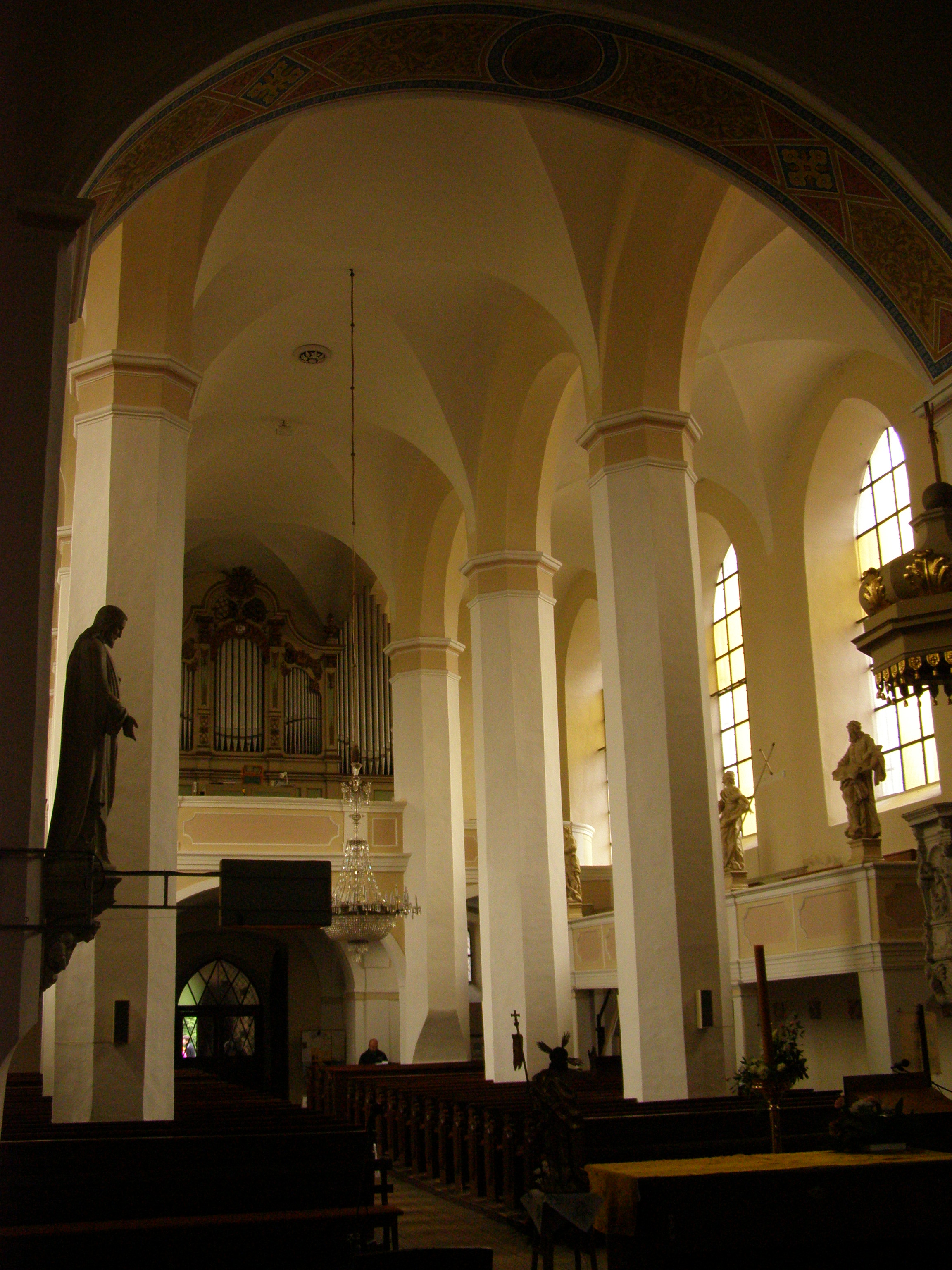 Frýdlant, kostel Nalezení svatého Kříže, boční kaple